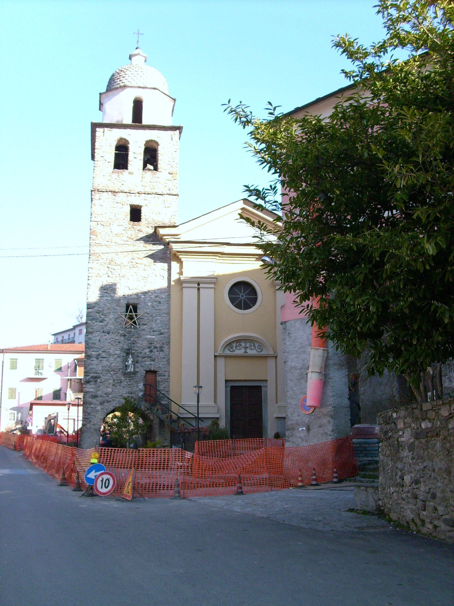 Chiesa di Santa Giustina, Rocchetta di Vara, Liguria, Italy